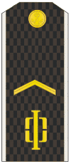 ст. матрос РФ